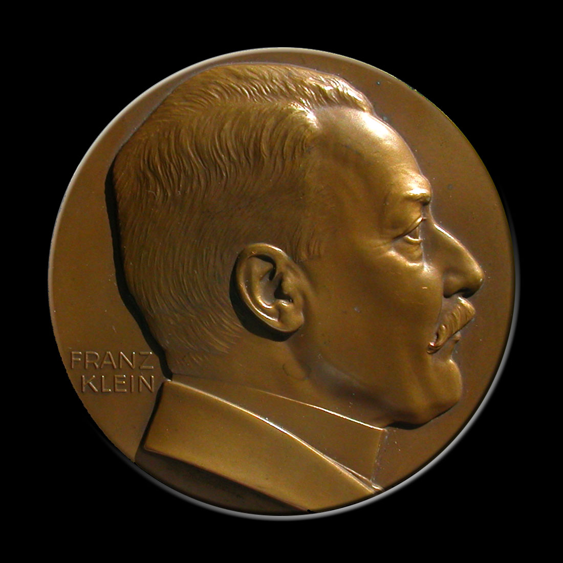 Franz Klein; Gedenkmedaille, rückseitig bezeichnet: Dem Meister u. Bildner des Rechtes zum sechzigsten Geburtstag von seinen Verehrern und Freunden 1914; Signiert: St. Schwartz